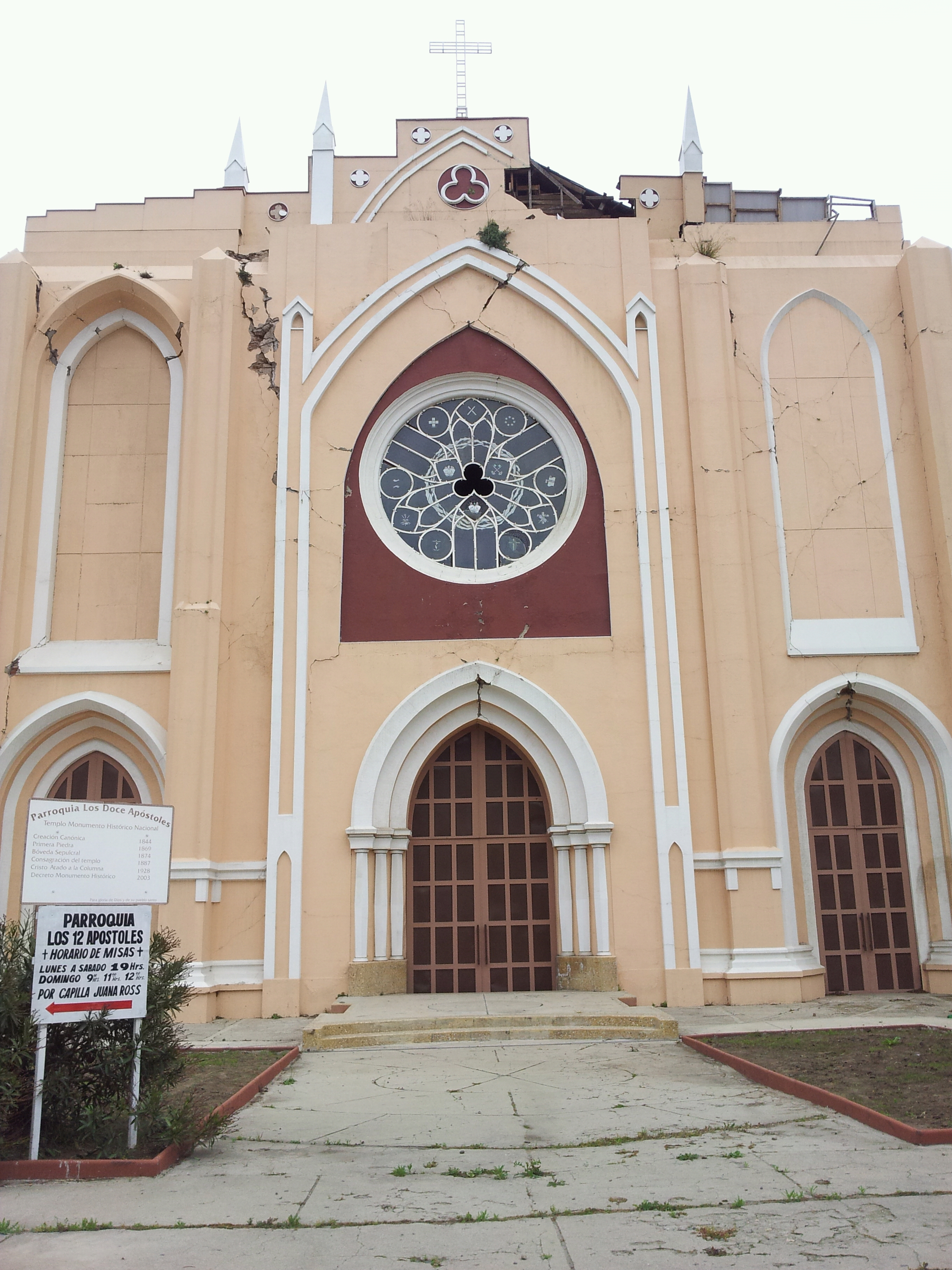 Iglesia de los Doce Apóstoles This is a photo of a national monument in Chile: 578